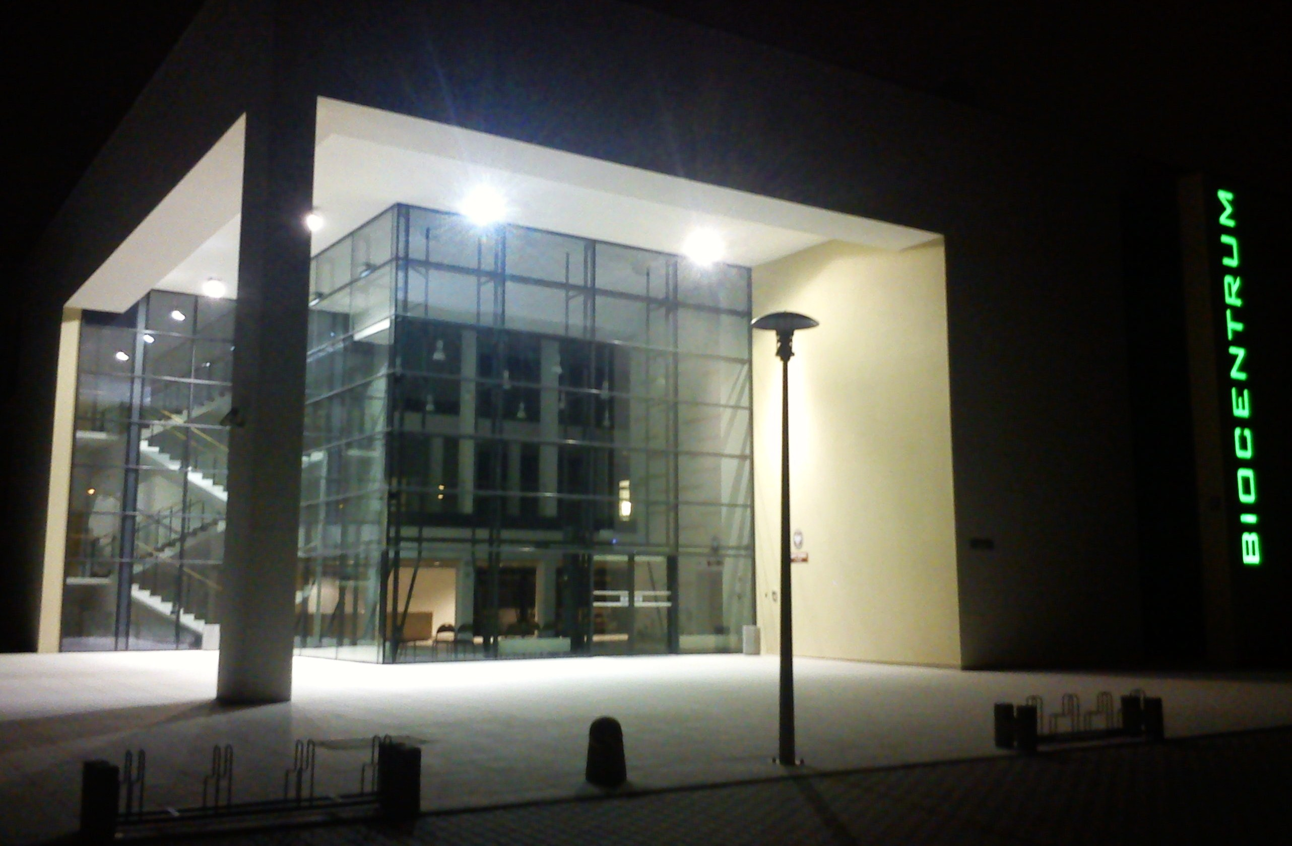 Biocentrum, Poznań, ul. Dojazd.